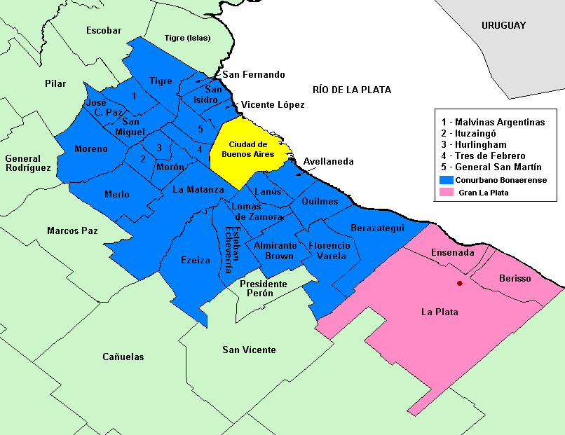 Conurbano Bonaerense. Fuente de datos: INDEC